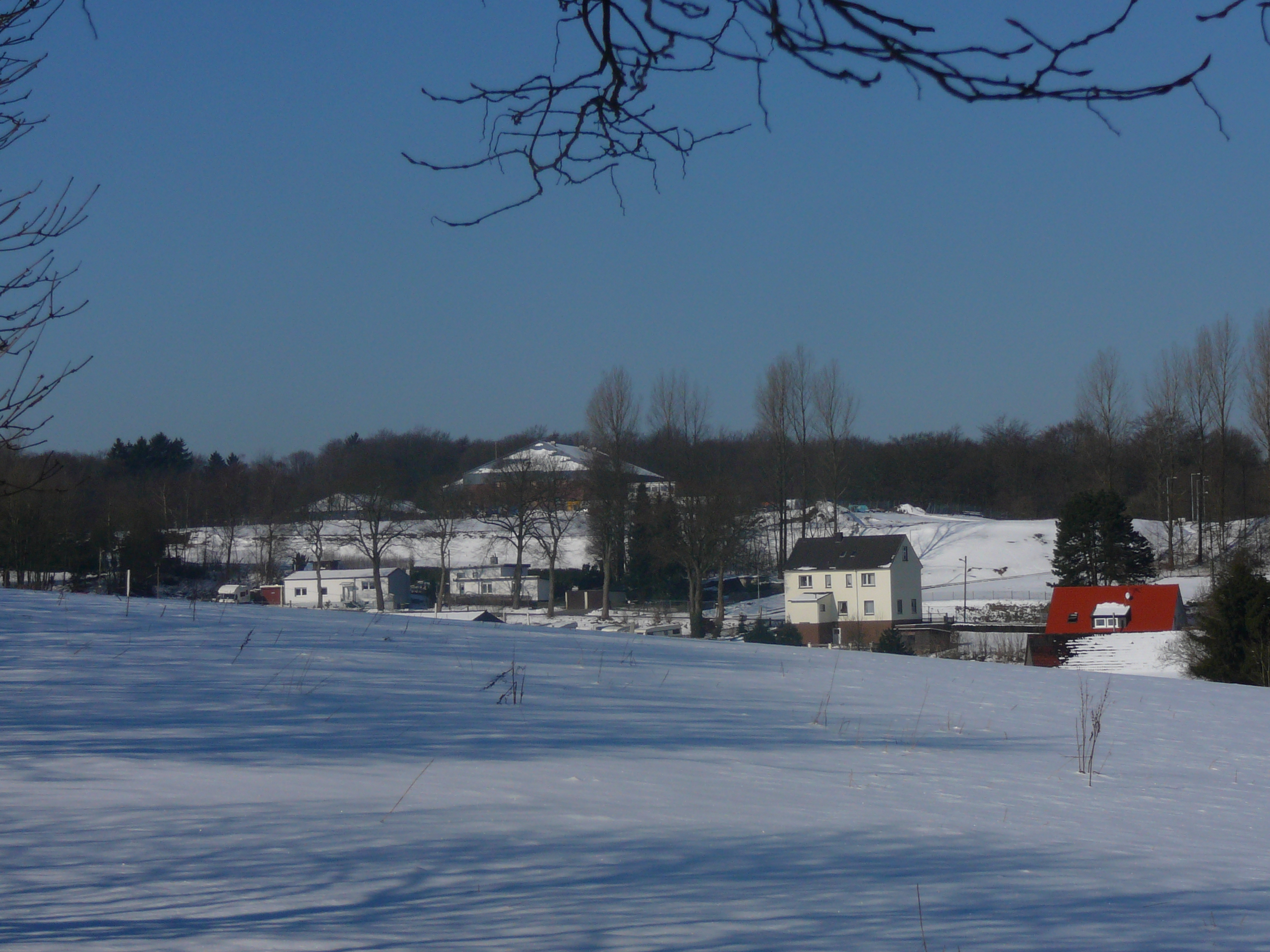 Parkstraße, Wuppertal